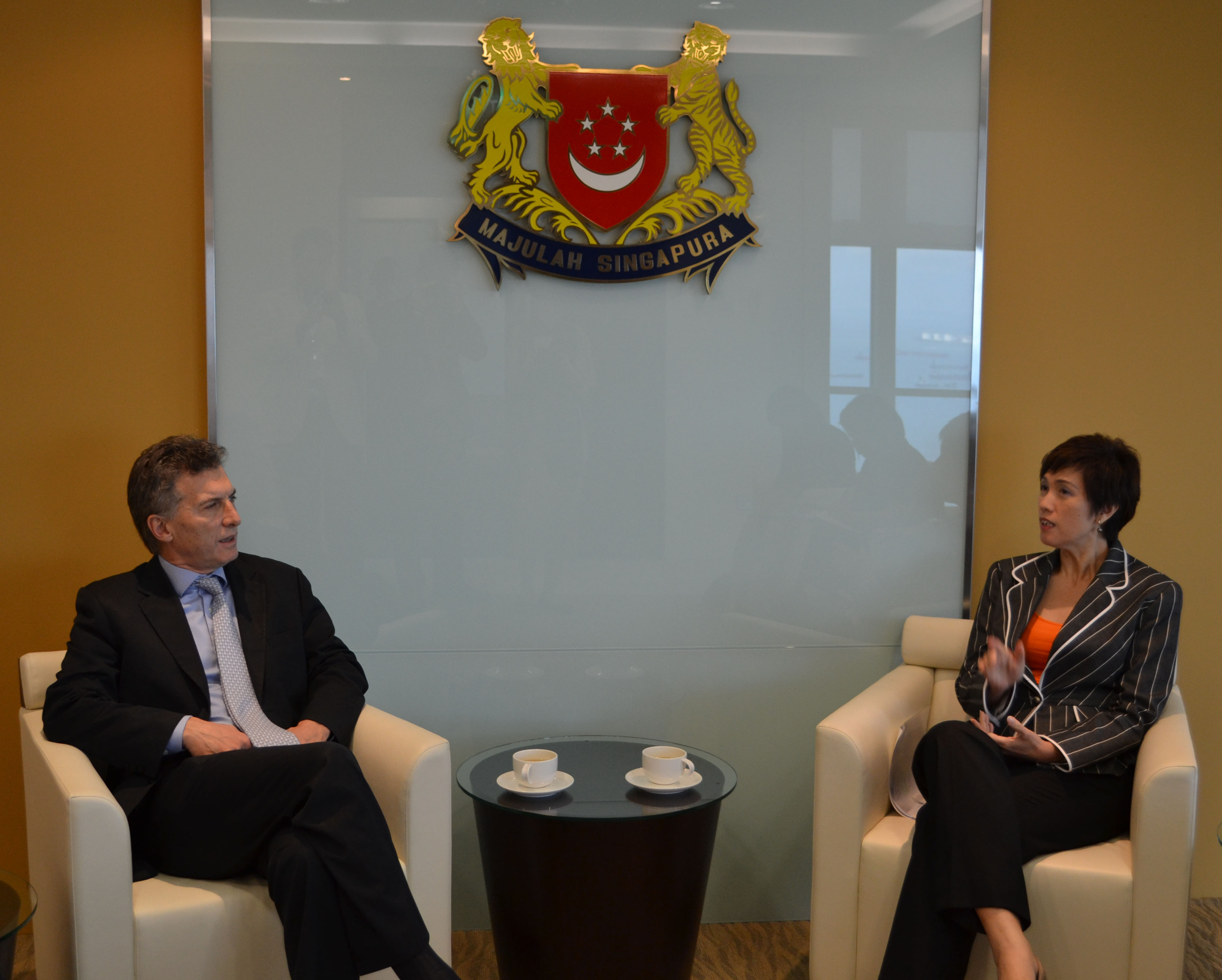 Singapur. Julio 2 de 2012. El jefe de Gobierno de la Ciudad de Buenos Aires, Mauricio Macri, se reunió hoy con la ministra de Estado de Finanzas y Transporte de Singapur, Josephine Teo.